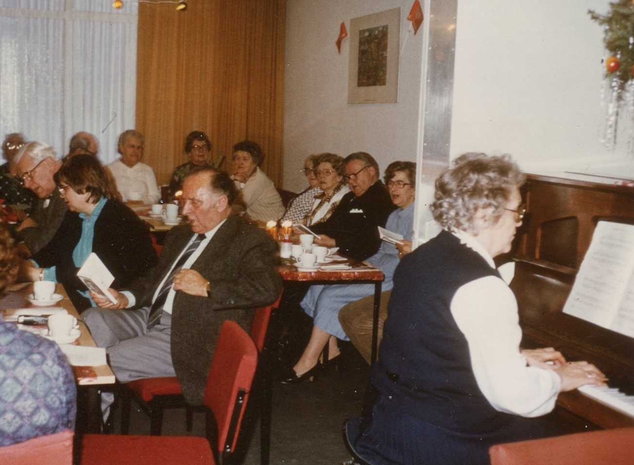 Weihnachtsfeier in der Altentagesstätte Averhoffstraße der Arbeiterwohlfahrt in Hamburg mit Sozialsenator Ernst Weiß